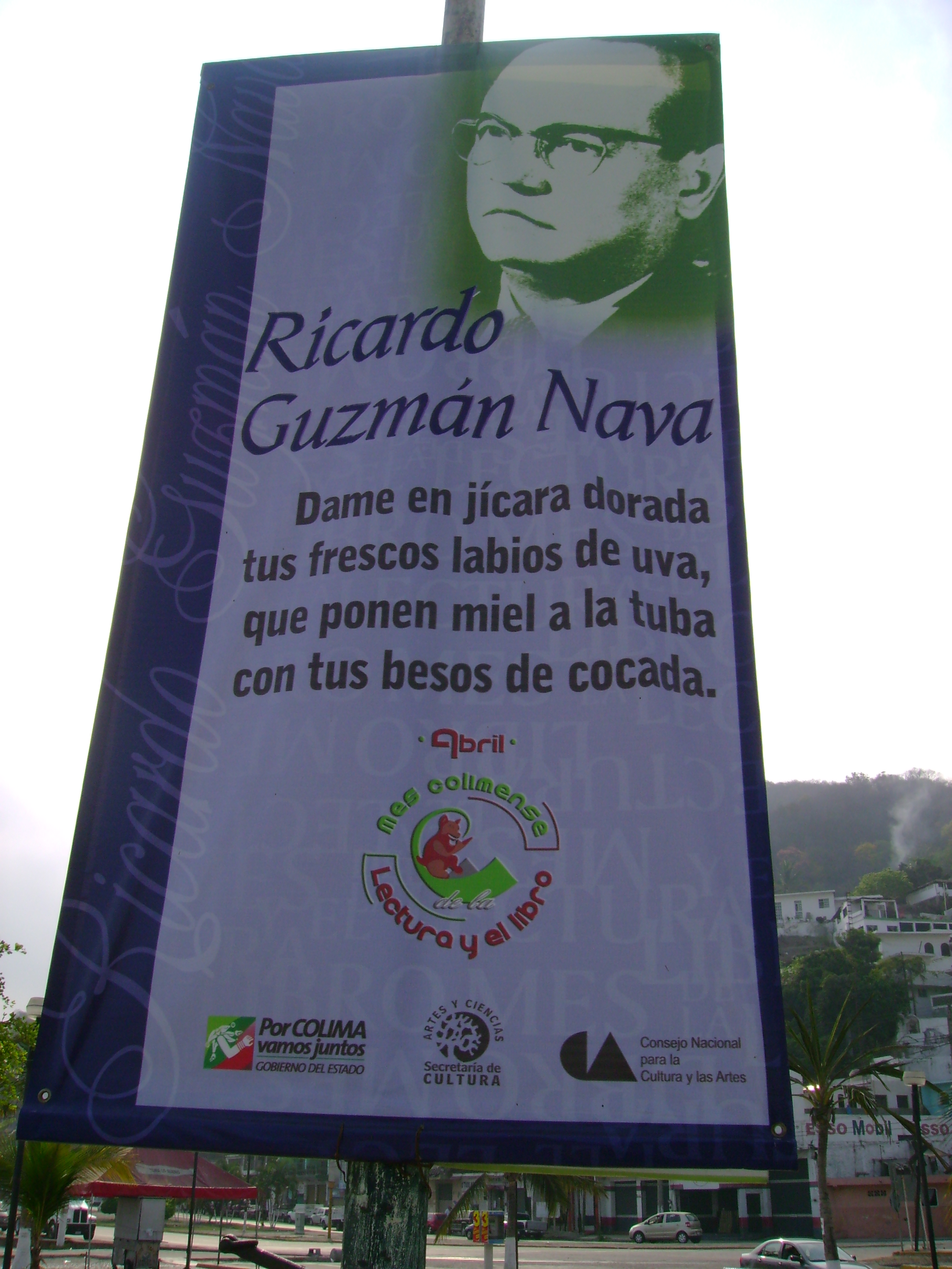 Cartel de Ricardo Guzman Nava en la ciudad de Manzanillo, Colima.